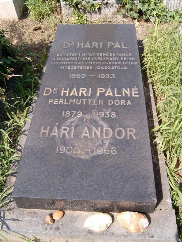 Hári Pál (Pest, 1869. augusztus 29. – Budapest, 1933. május 10.) biokémikus, egyetemi tanár sírja Budapesten. Kozma utcai izraelita temető: 5B-11-25.